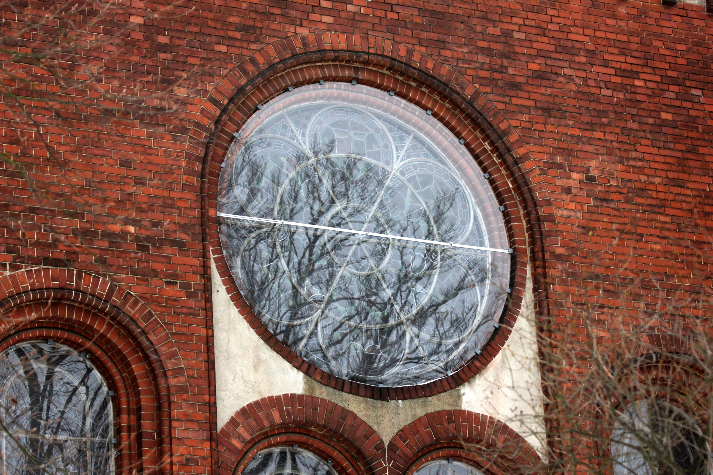 Luckenwalde in Brandenburg: Die Jakobikirche, Rosettenfenster. Das Gebäude ist ein eingetragenes Baudenkmal.